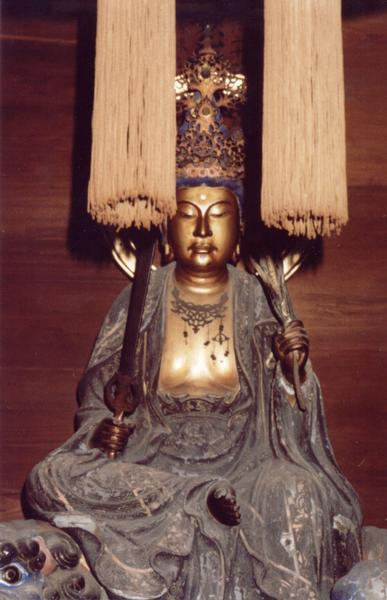 Bodhisattva Manjusri Myoshinji-sodo / Kyoto / Japan Picture taken by Bunyu